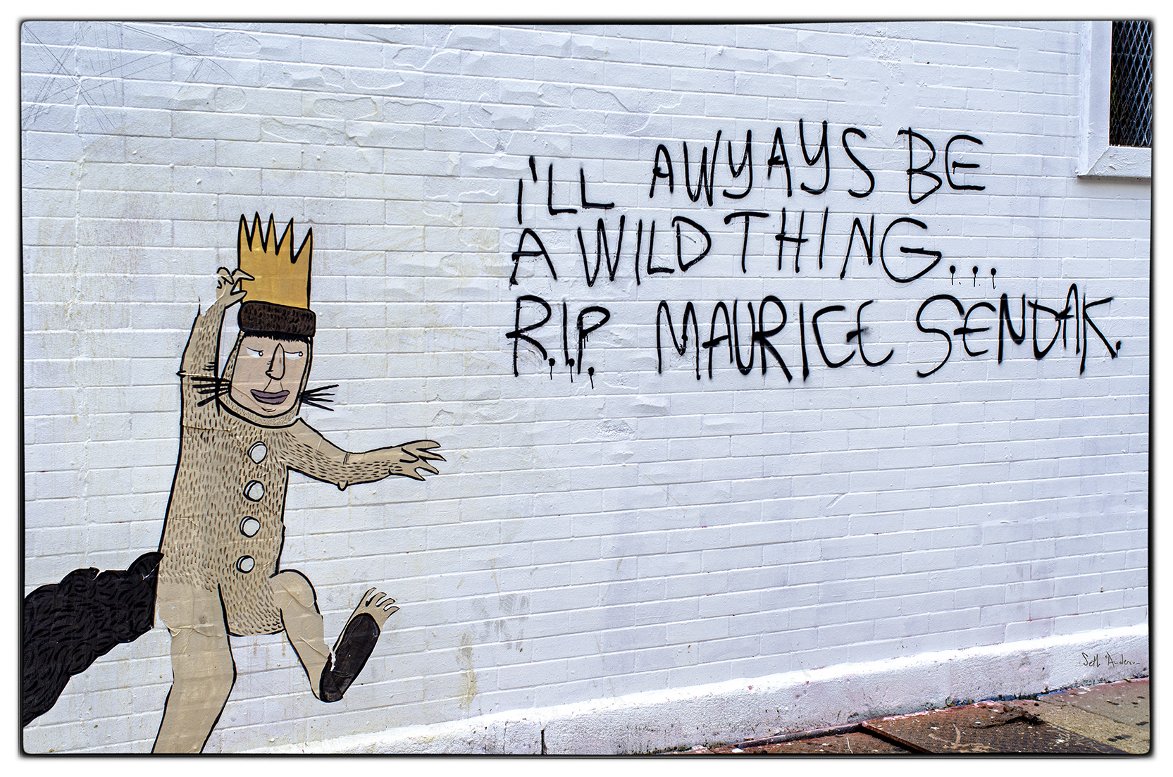 Wicker Park. Artist: don’t fret